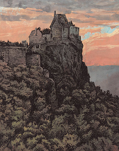 Burgruine Aggstein.label QS:Lde,"Burgruine Aggstein."